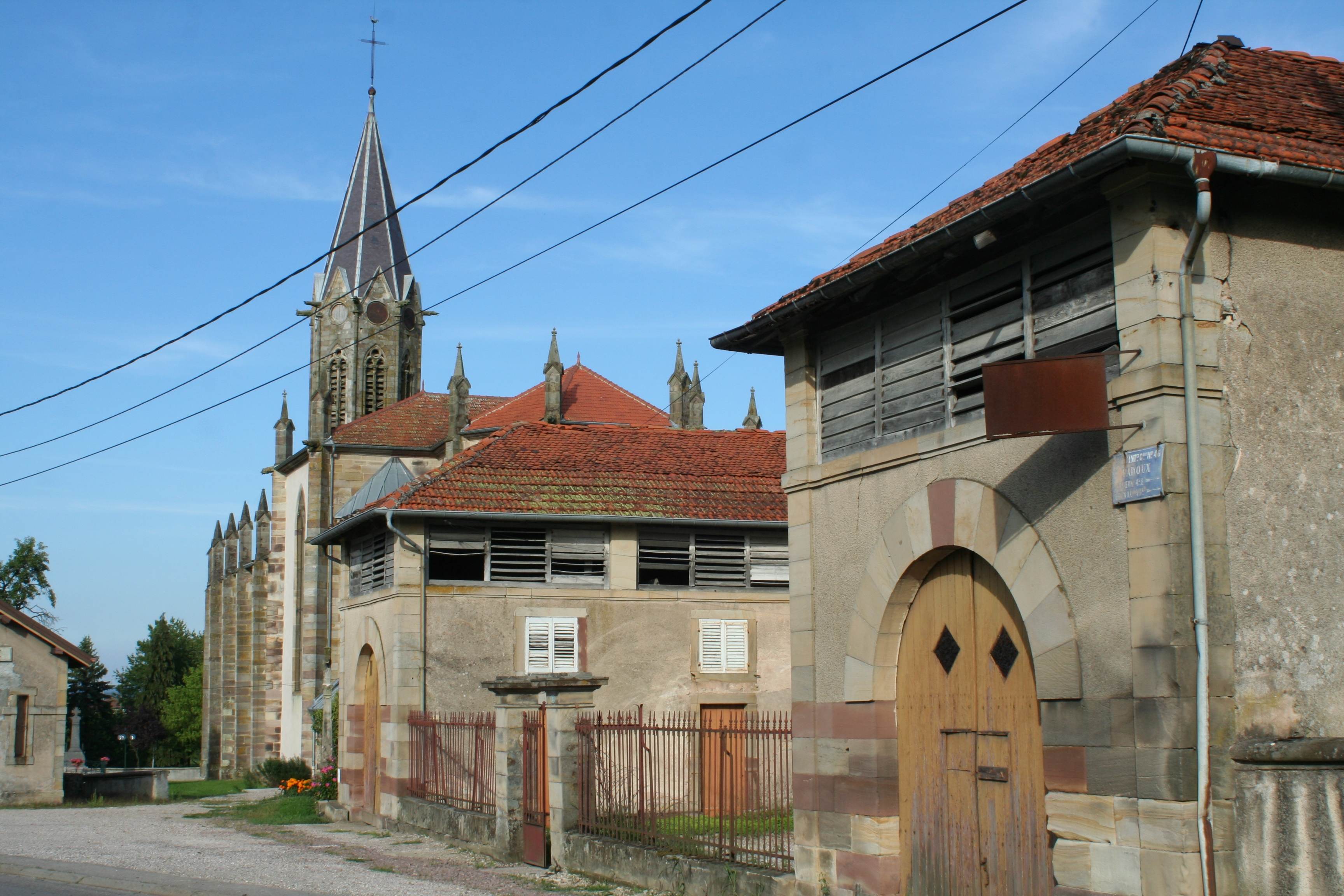 Presbytère et clocher de l'église Sainte-Libaire de Padoux (Vosges)